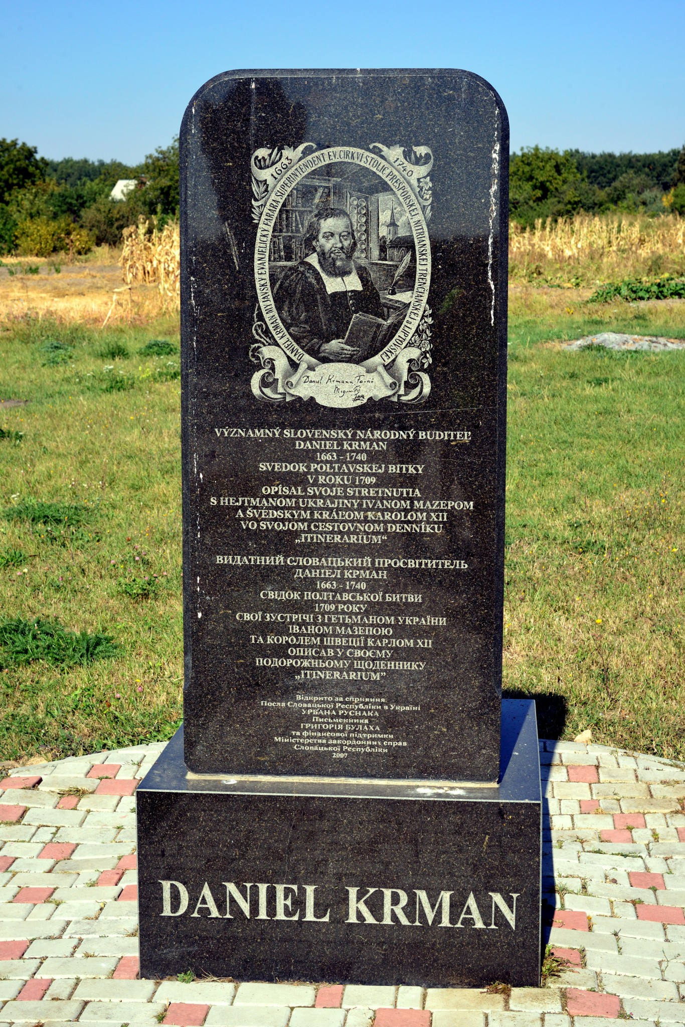 Пам’ятний знак словацькому просвітителю Д.Крману (1663 − 1749)., с. Жуки, центр